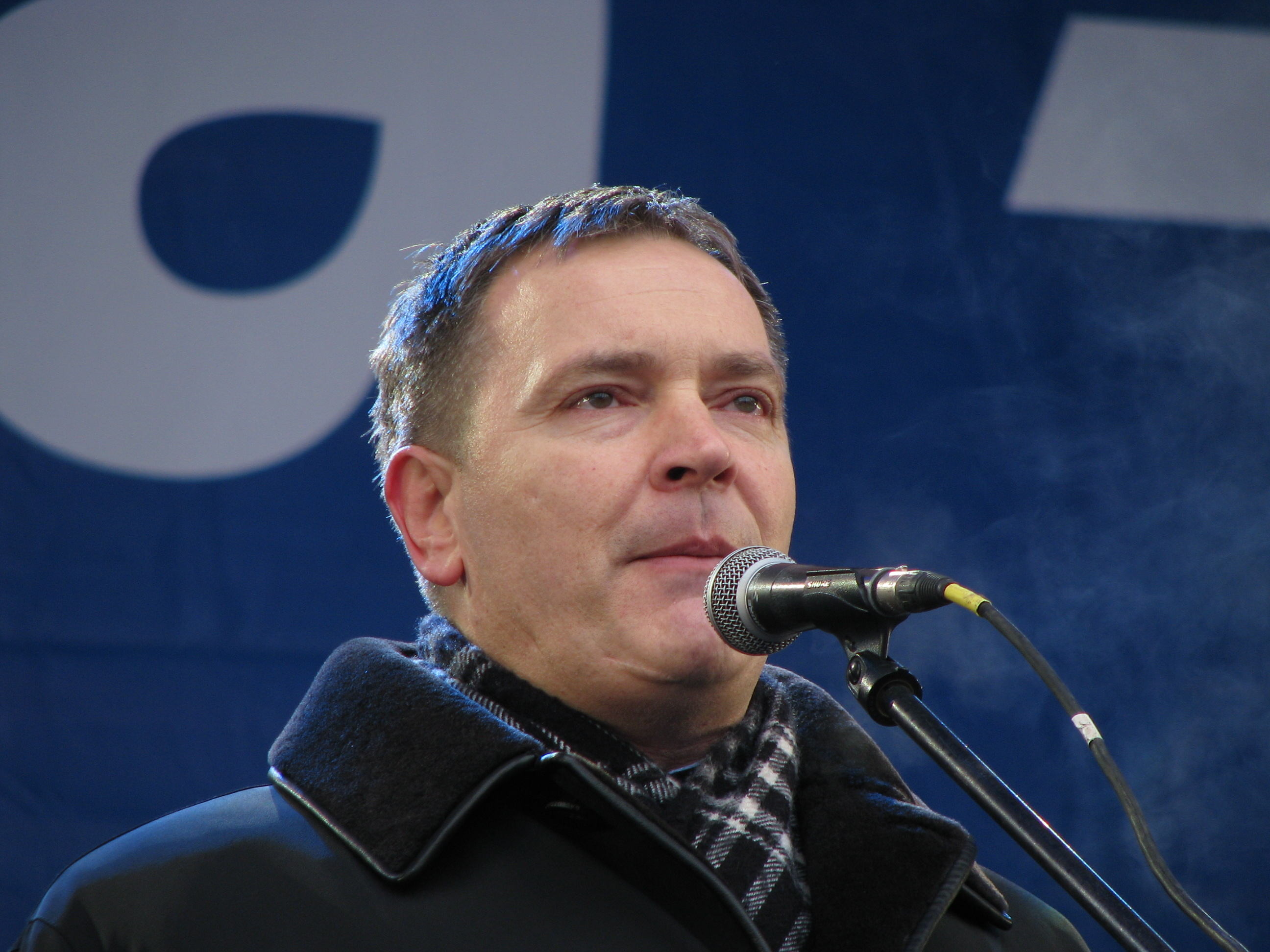 Выступление В. В. Колесниченко на митинге у стен ЦИК Украины в поддержку правильного подсчета голосов на президентских выборах 2010 года на Украине 8 февраля 2010 года